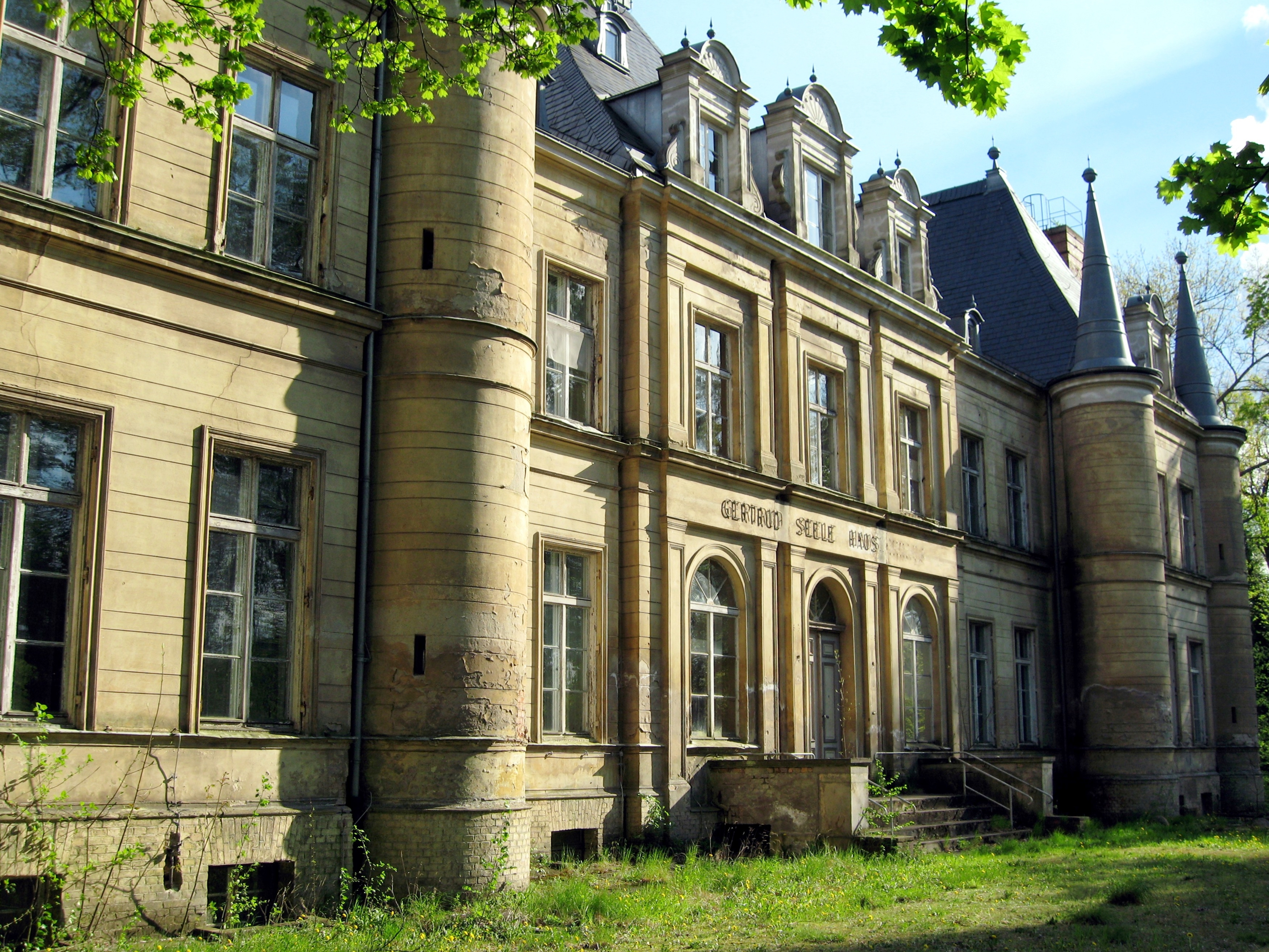 Schloss des Ortes Lanke in der Gemeinde Wandlitz, Landkreis Barnim, Land Brandenburg, Deutschland